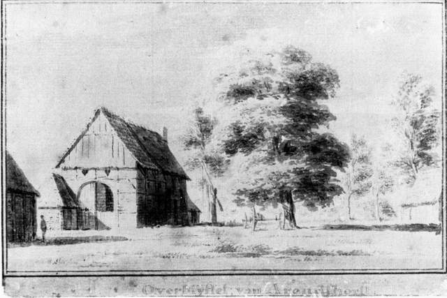 Overblijfselen havezate Arendshorst bij Varsen, Ommen